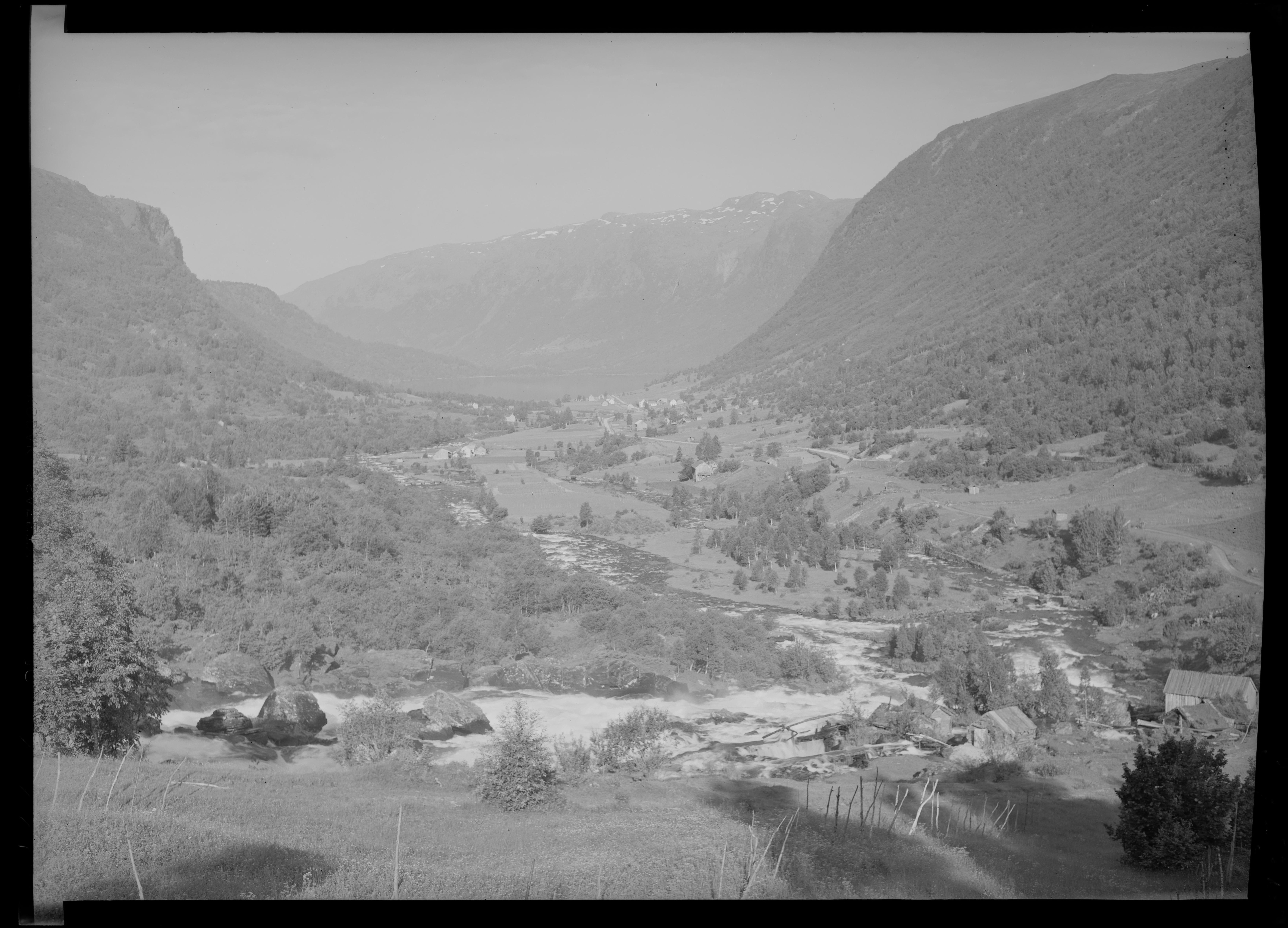 Bildet er hentet fra Nasjonalbibliotekets bildesamling. Anmerkninger til bildet var: Fotograf : ukjent